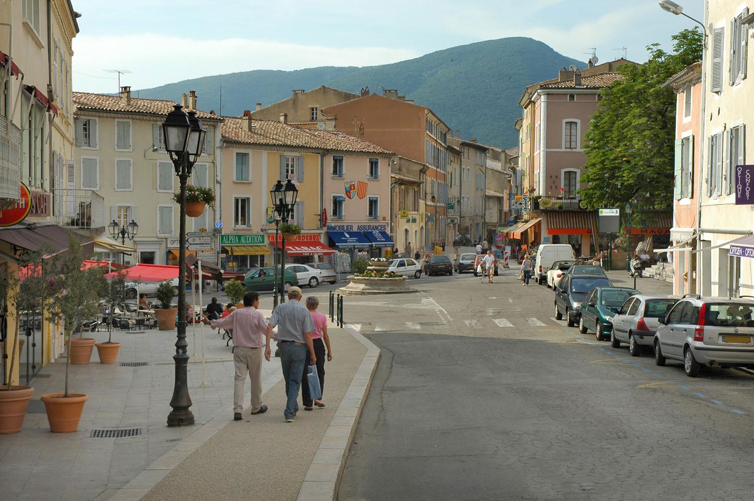 Place centrale de Dieulefit